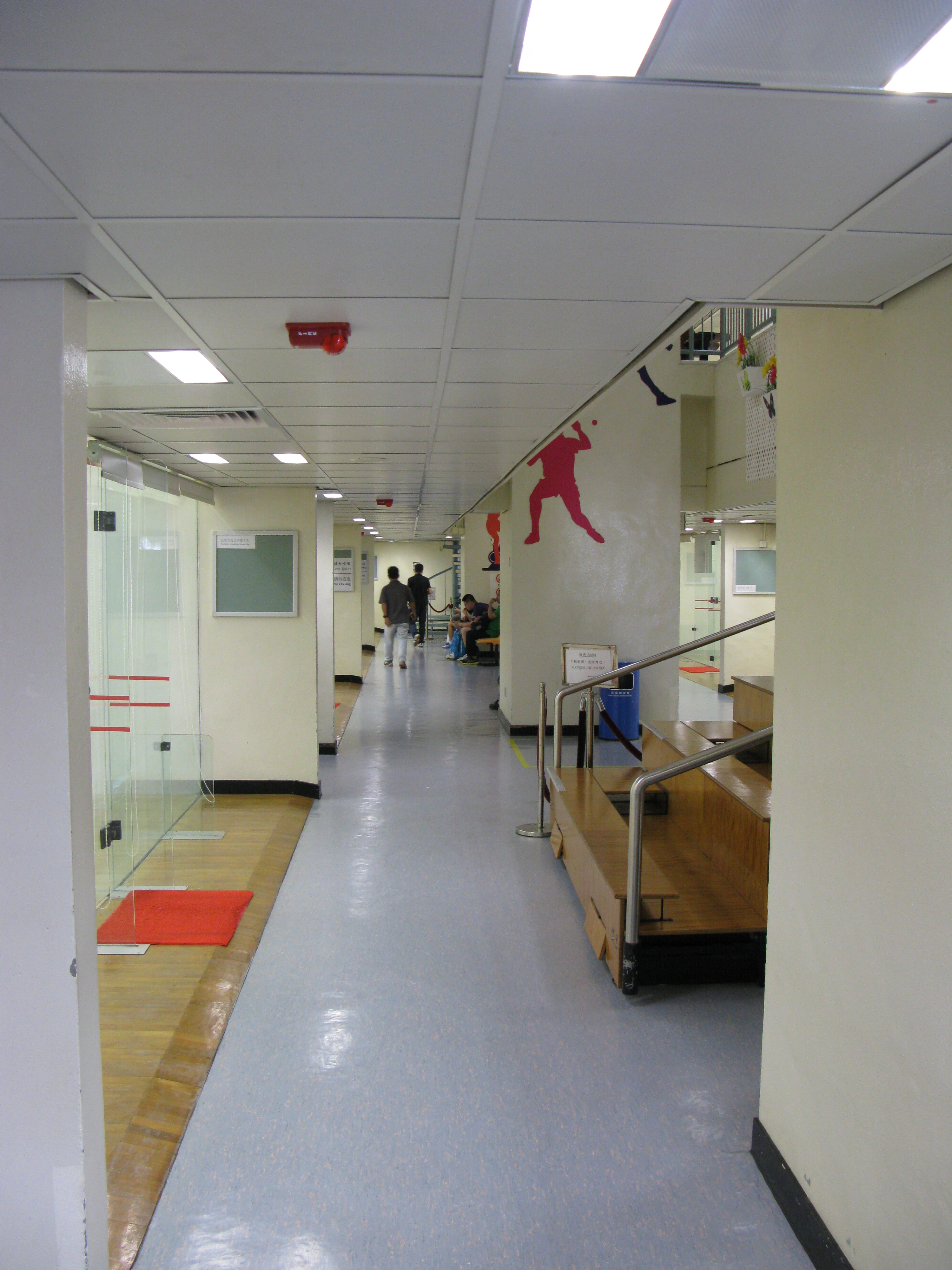 官涌體育館內一景